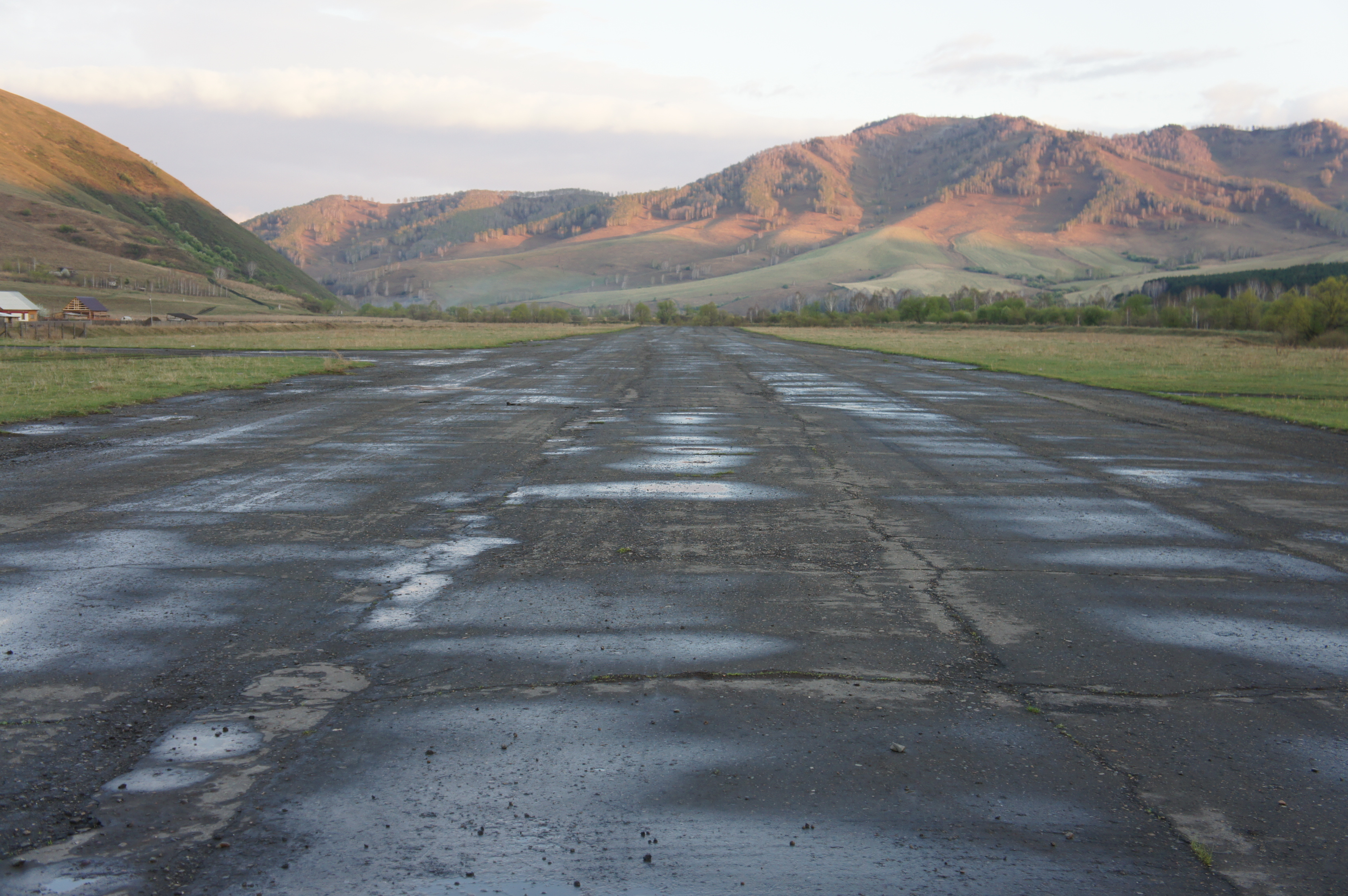 Взлетно-посадочная полоса Солонешенского аэродрома